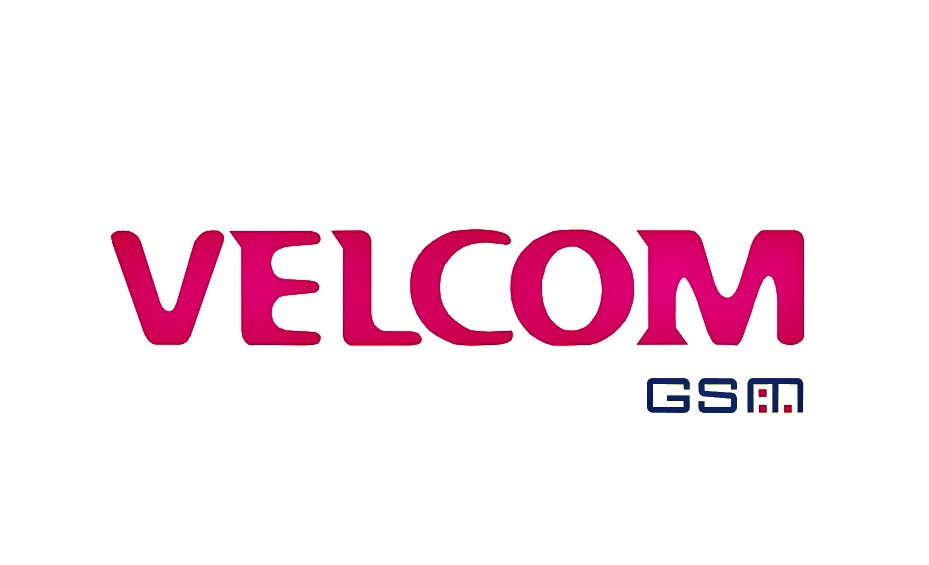 Первый логотип velcom